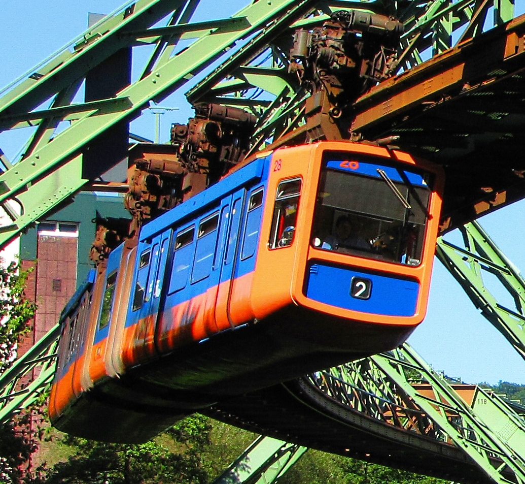 Die Wuppertaler Schwebebahn legt sich in Elberfeld kurz vor der Sonnborner Eisenbahnbrücke "in die Kurve".